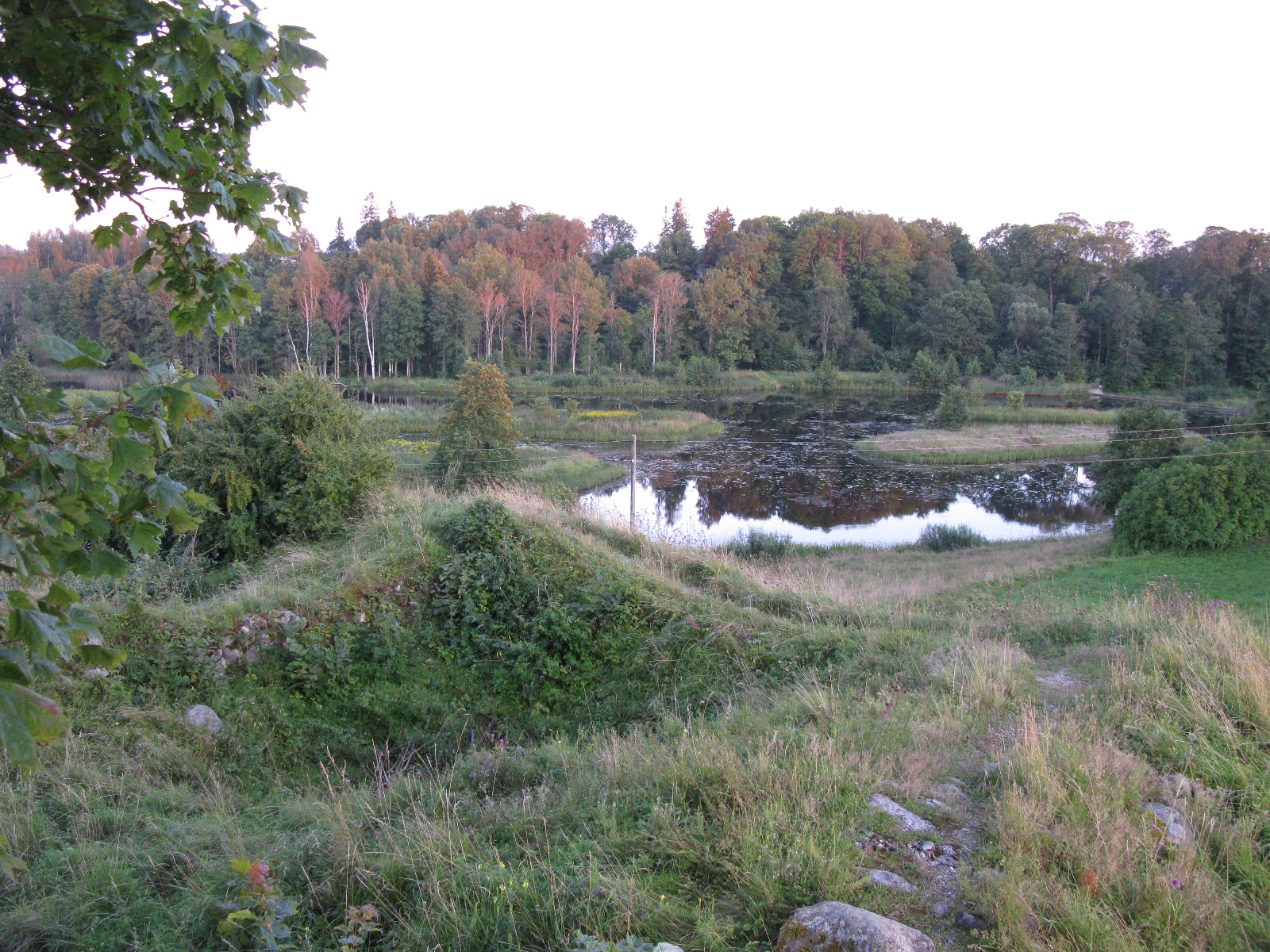 Vaade linnuse edelanurgast veskipaisjärvele.